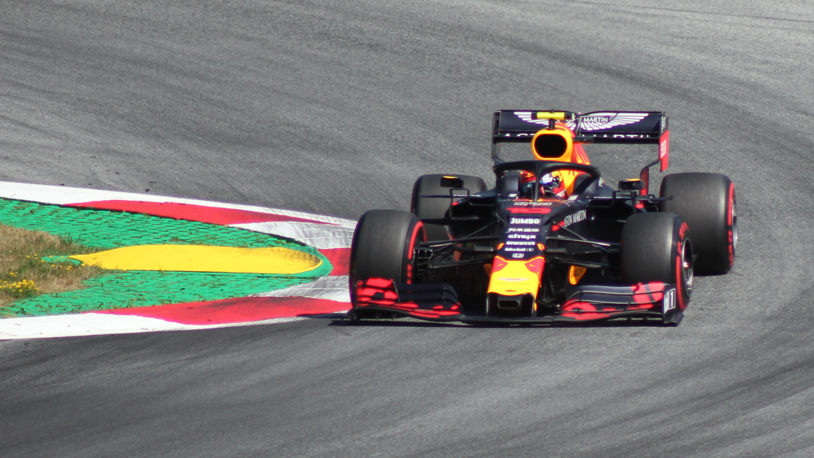 Gasly beim Rennwochenende in Österreich 2019